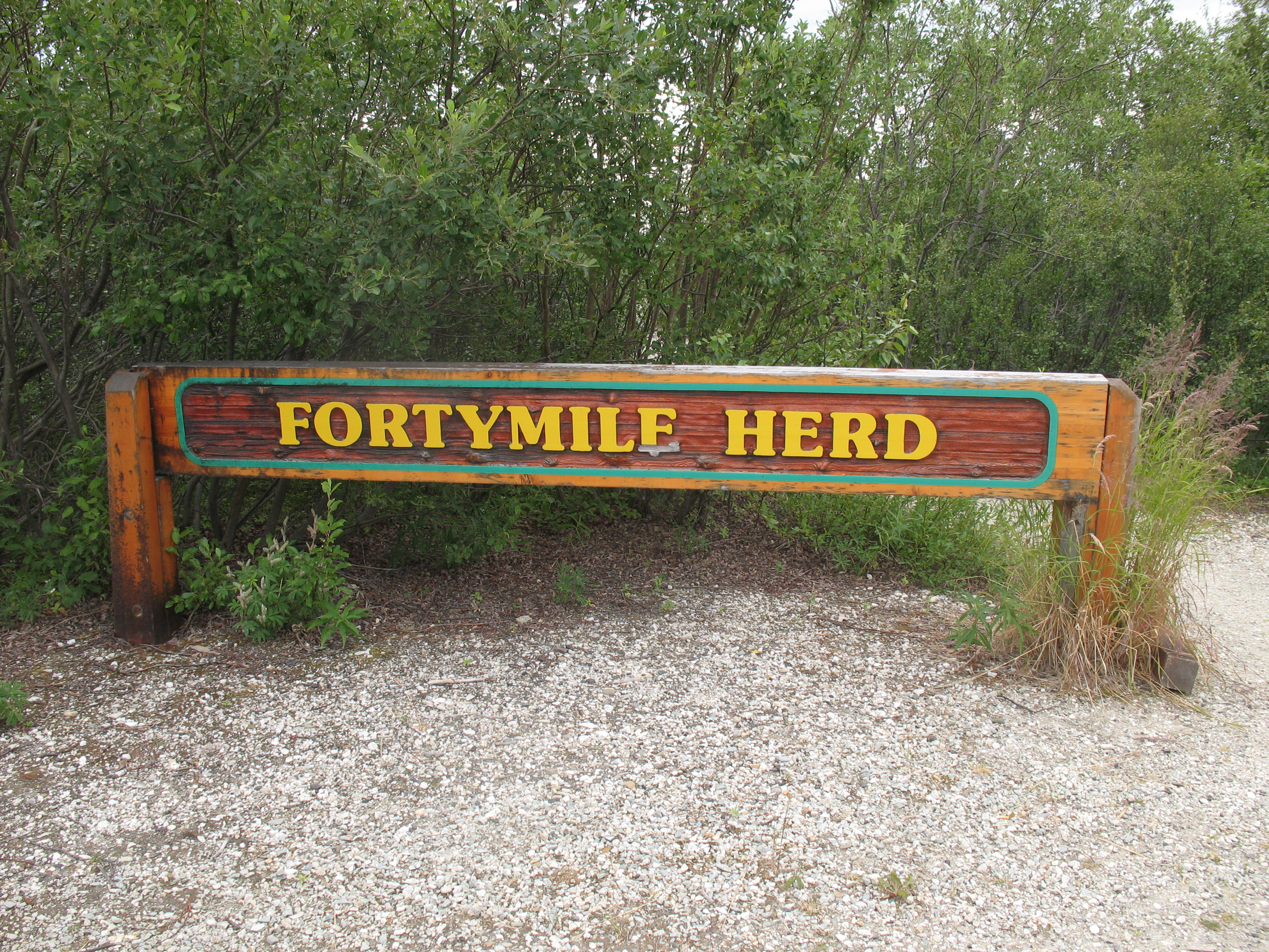 Erinnerung an die Forty Mile Herd, eine Karibuherde in Alaska und Yukon, am Top of the World Highway